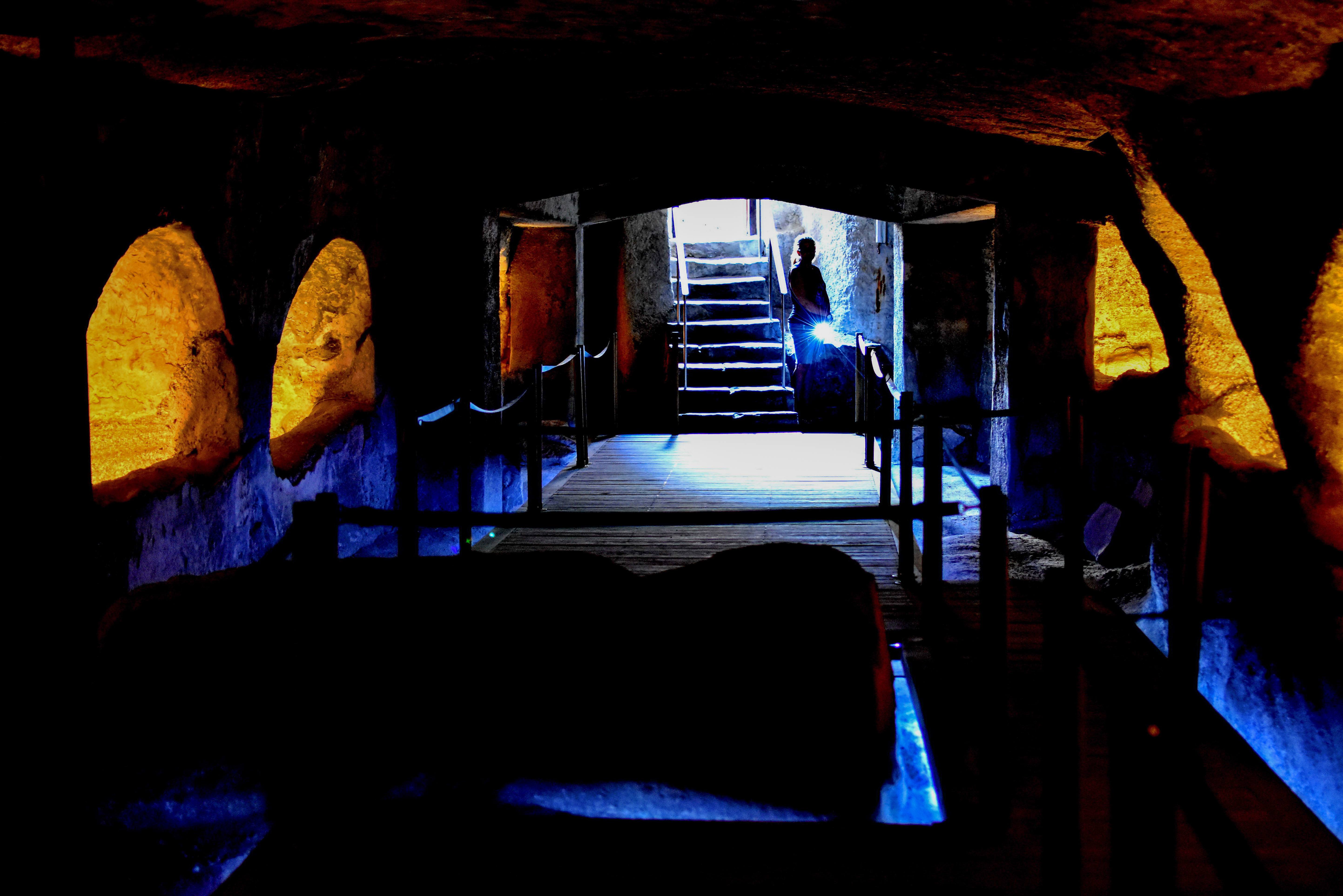 Κατακόμβες Μήλου«Κατακόμβες Μήλου»